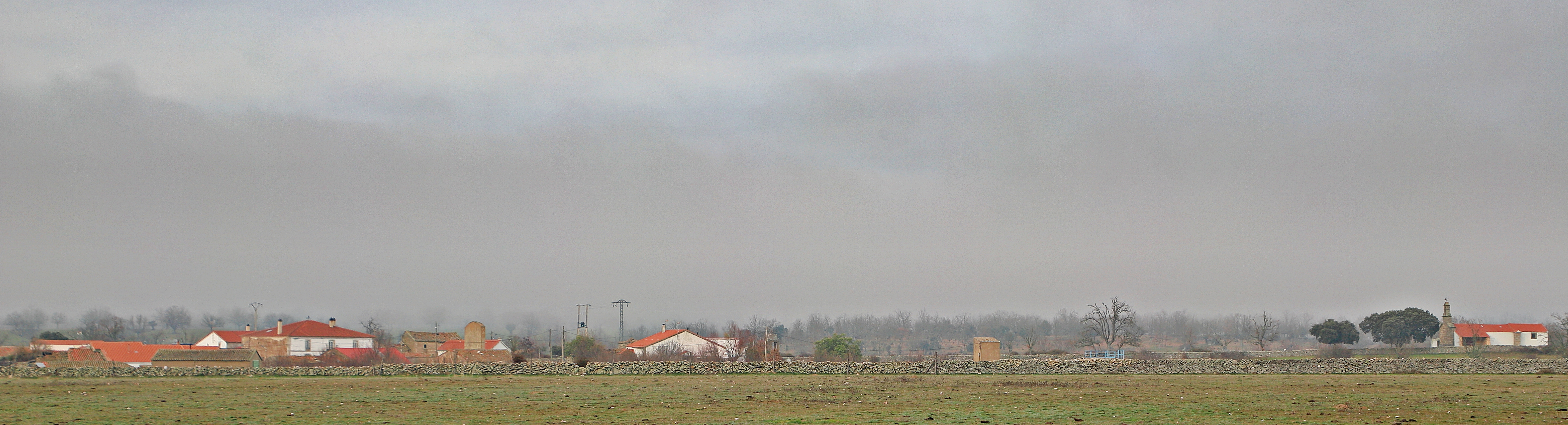 Localidad del municipio de Espadaña, en la comarca de Vitigudino, provincia de Salamanca